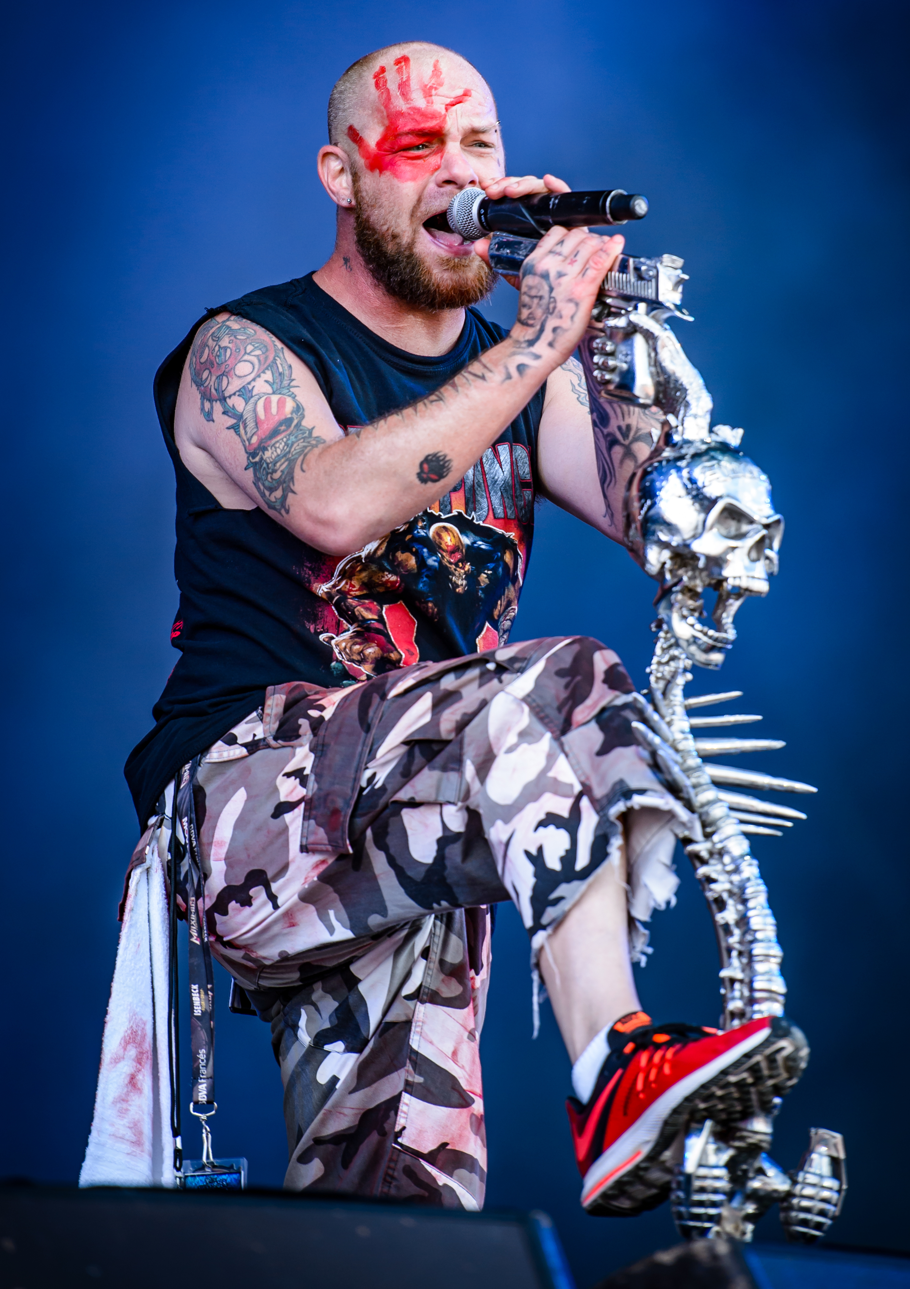 'Rock im Park 2017; Nürnberg': 'Five Finger Death Punch'